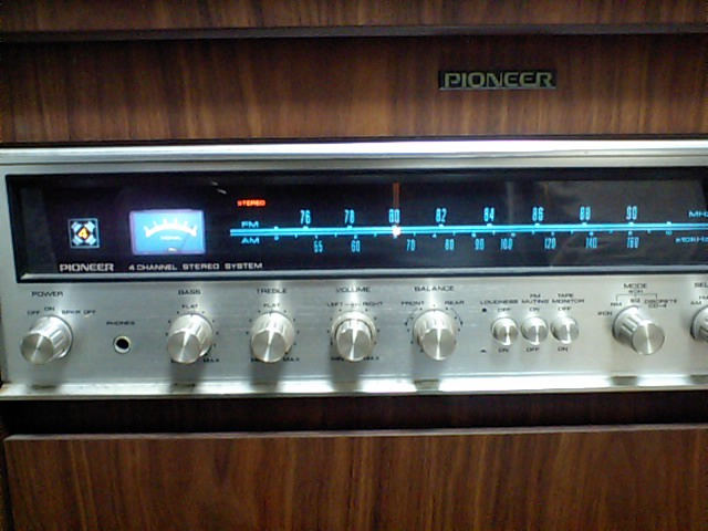 CD4インジケーター